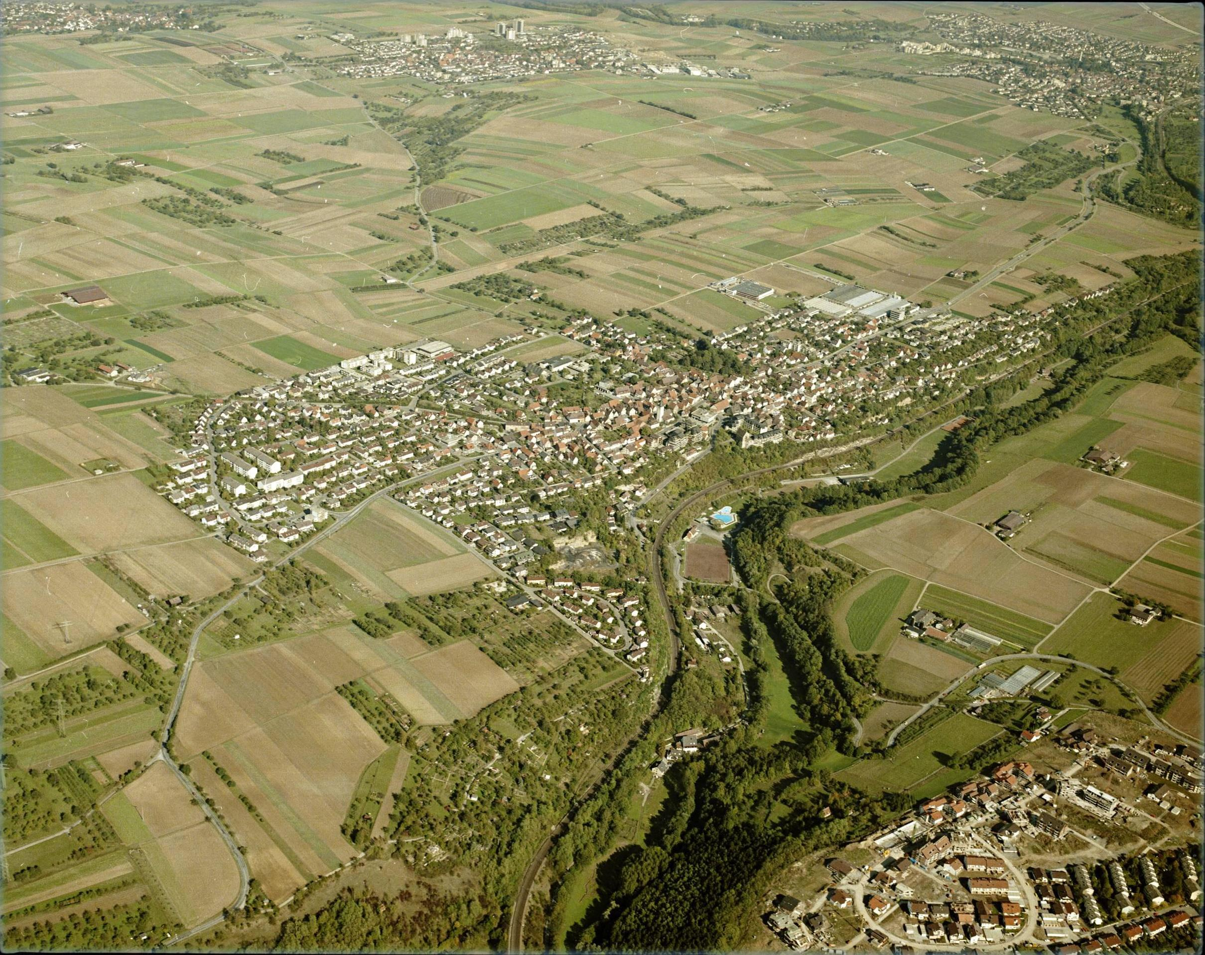 Luftbild von Höfingen - Staatsarchiv Sigmaringen - Archivalieneinheit N 1/96 T 1 Nr. 497